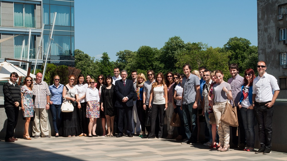 Др Марић са полазницима и предавачима Курса „Preparation, use and publication of case descriptions in psychiatry" (Београд, 2013). Власништво проф.др Нађе Марић